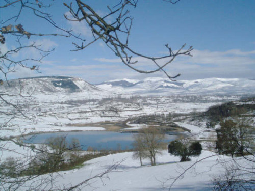 Fotografía de la Laguna de Bárcena de Pienza, en Invierno, nevado.